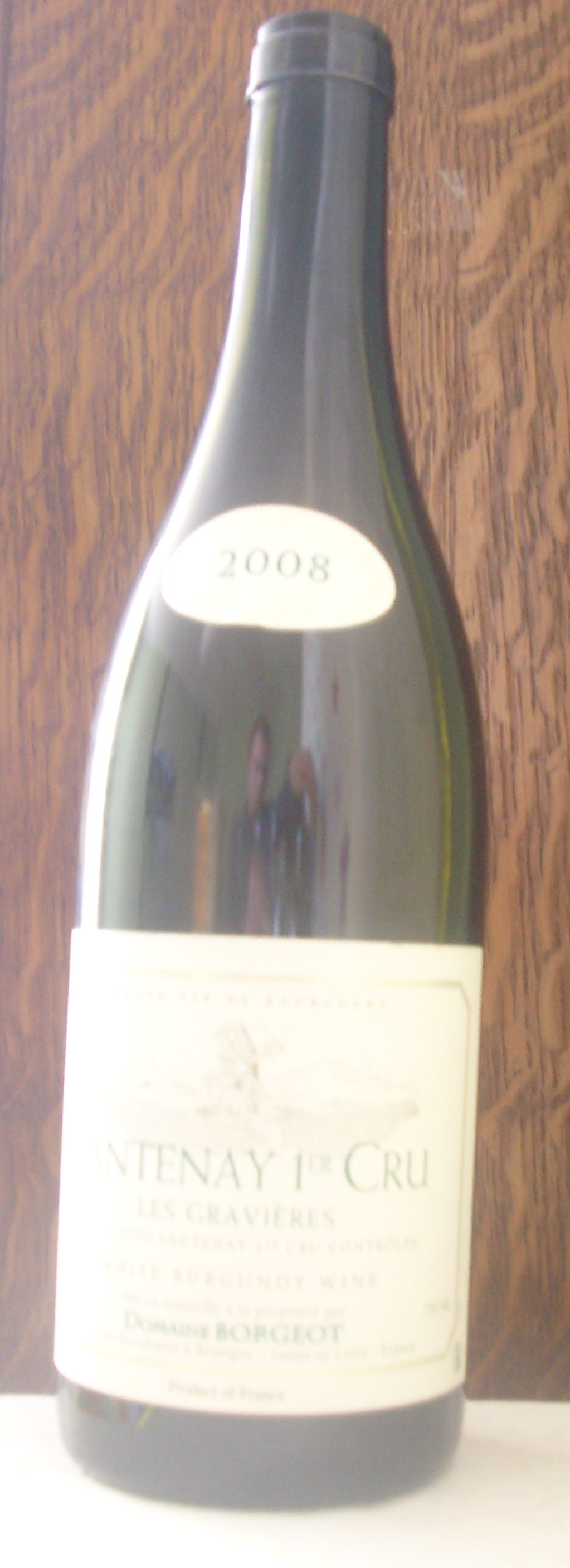 Bouteille de Santenay 1er cru Les Gravières (Domaine Borgeot)